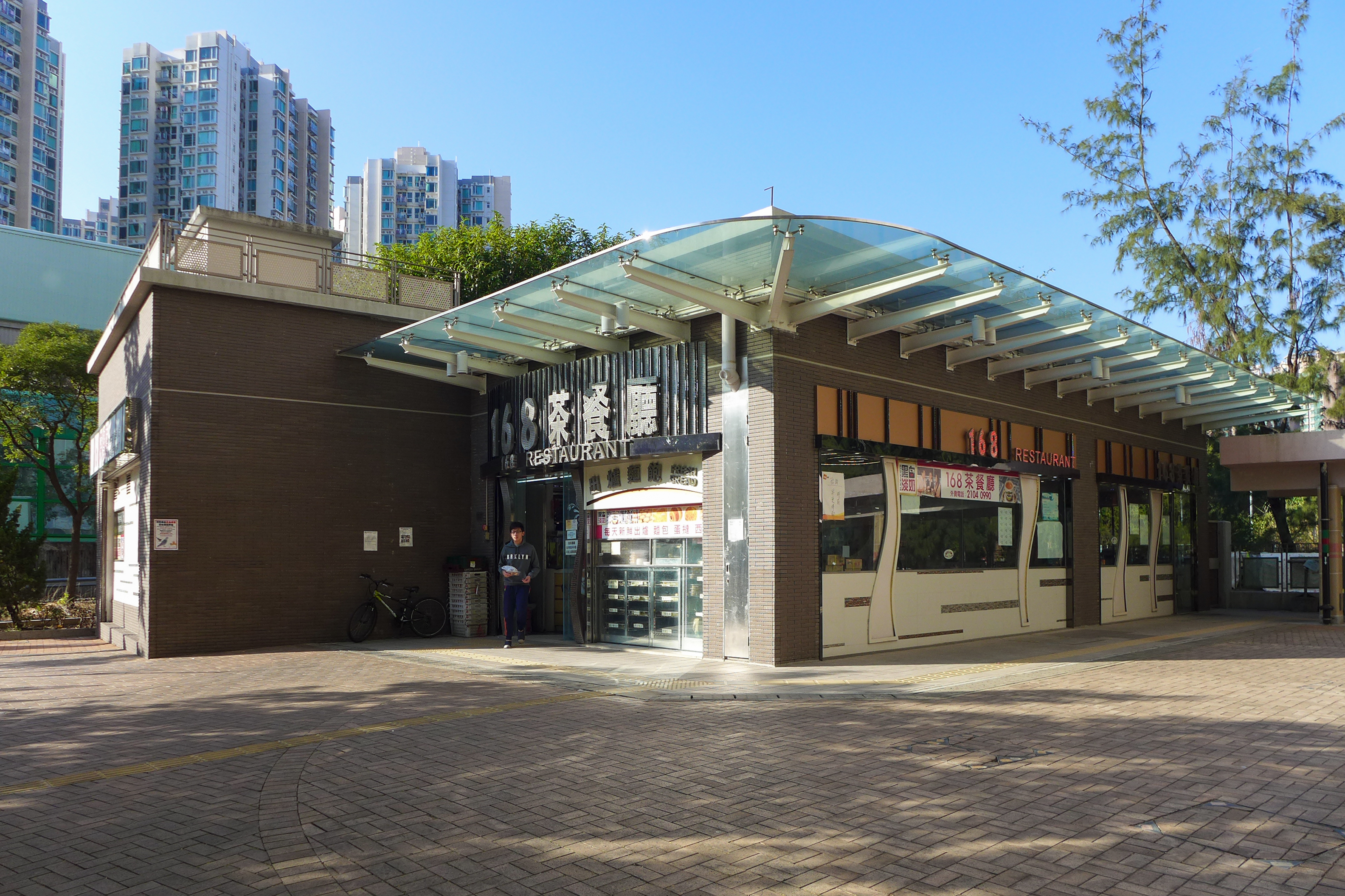 Yan On Estate 168 Restaurant